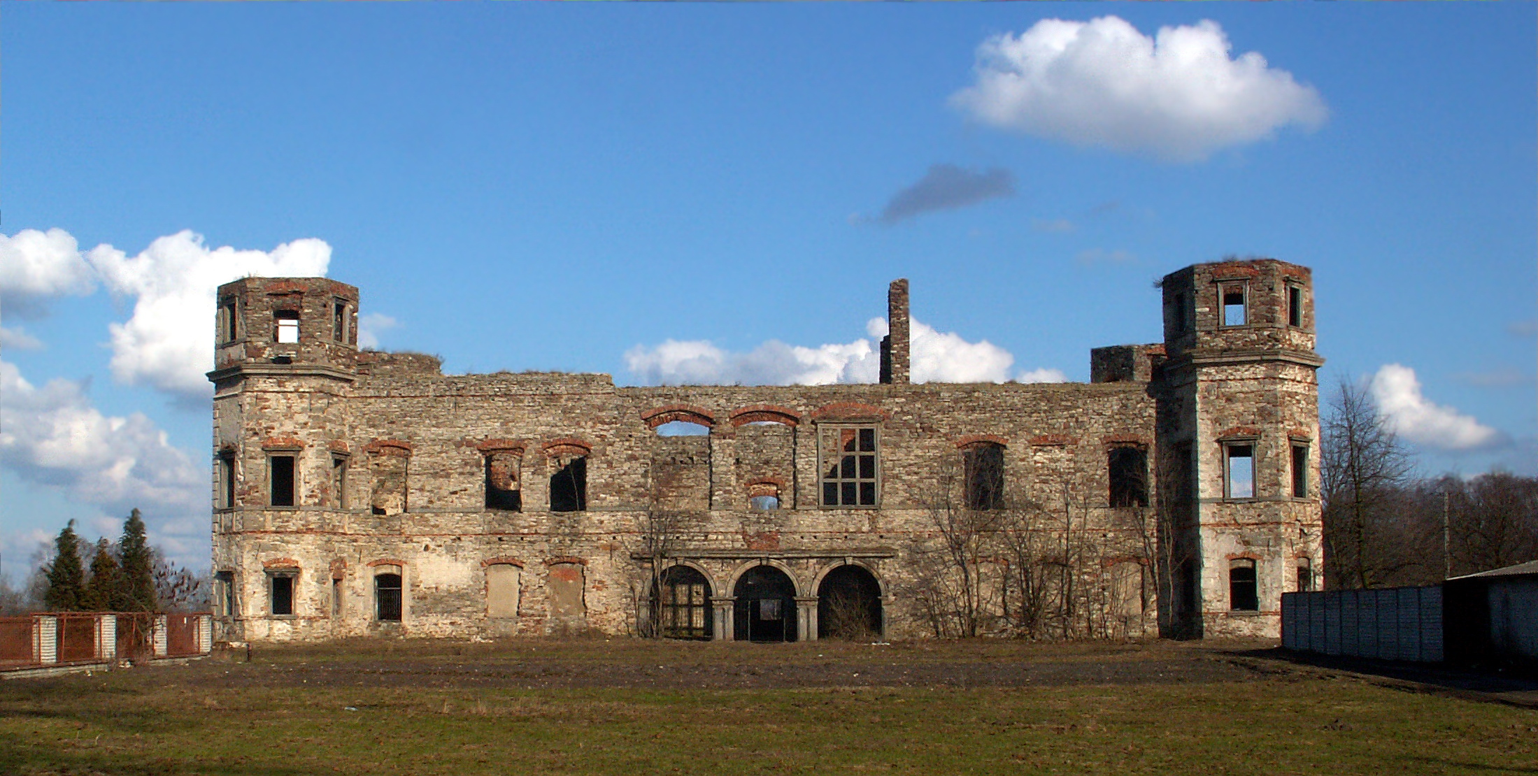 Palace in Podzamcze Piekoszowskie (Poland)